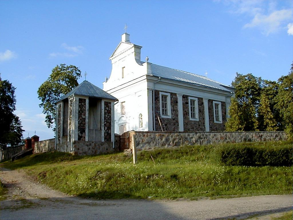 Ezernieku baznīca 2000-07-22